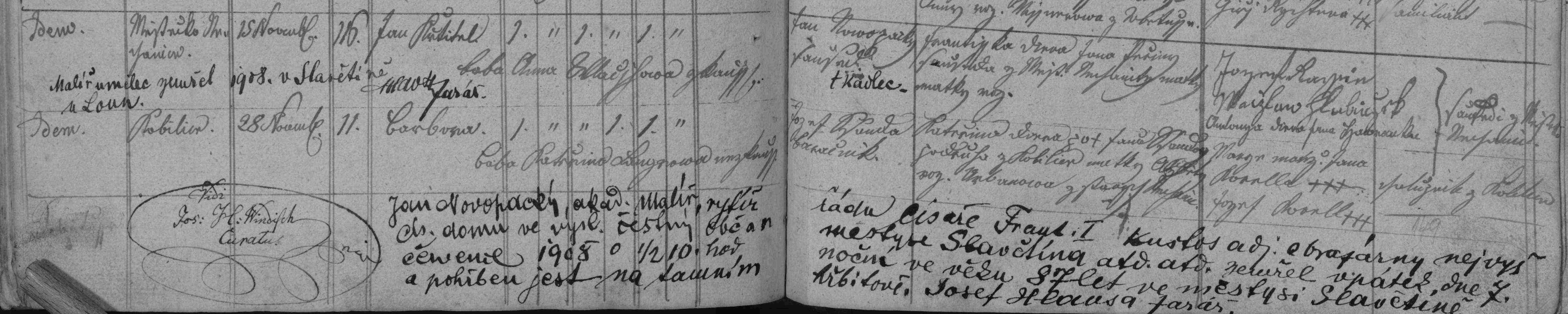 záznam o nar. malíře Jana Nowopackého, matrika N 1809-1822 města Nechanice (SOA Zámrsk)